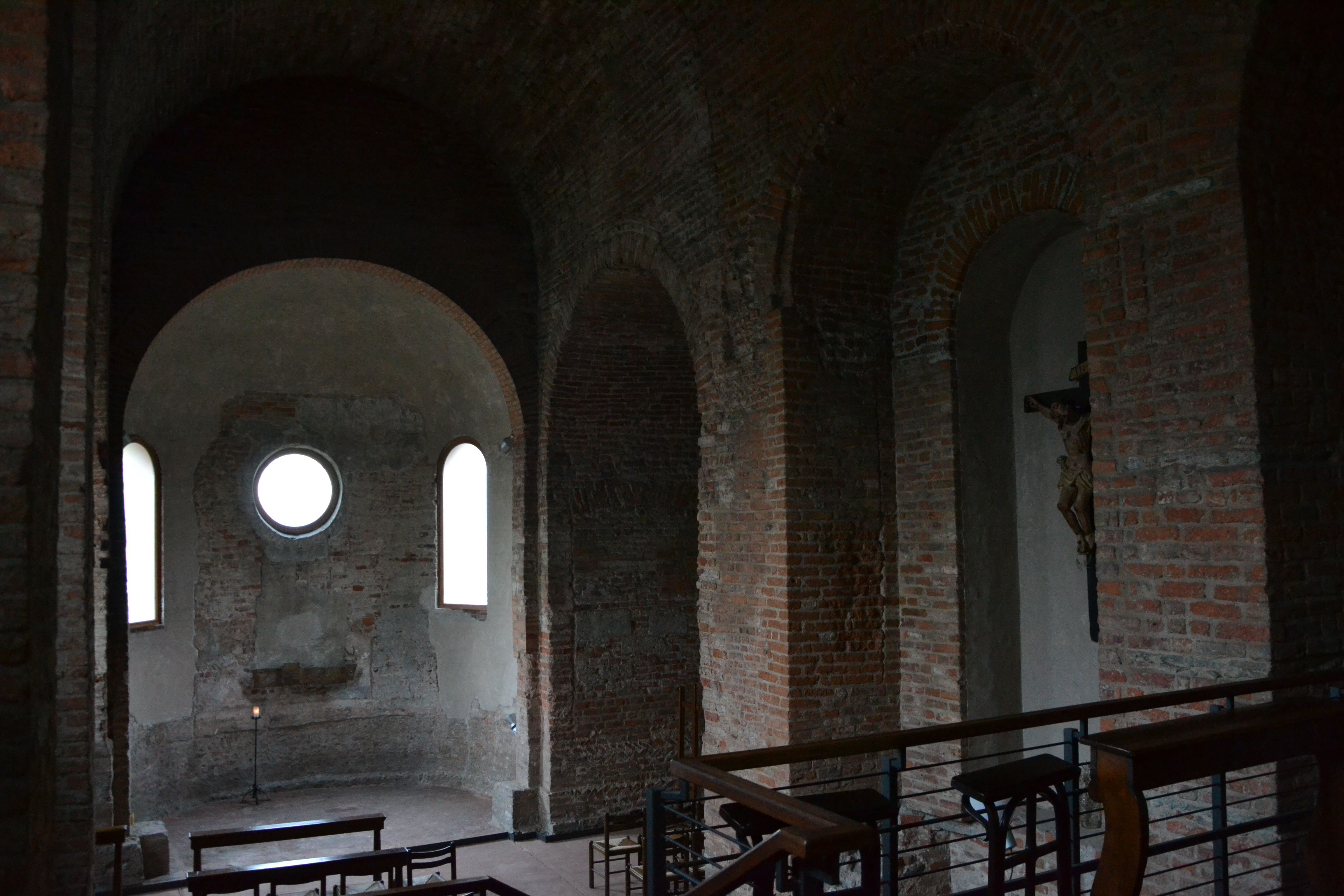 sacello dei martiri dell'Anaunia (Martirio, Sisinnio ed Alessandro) Basilica di San simpliciano (Milano)